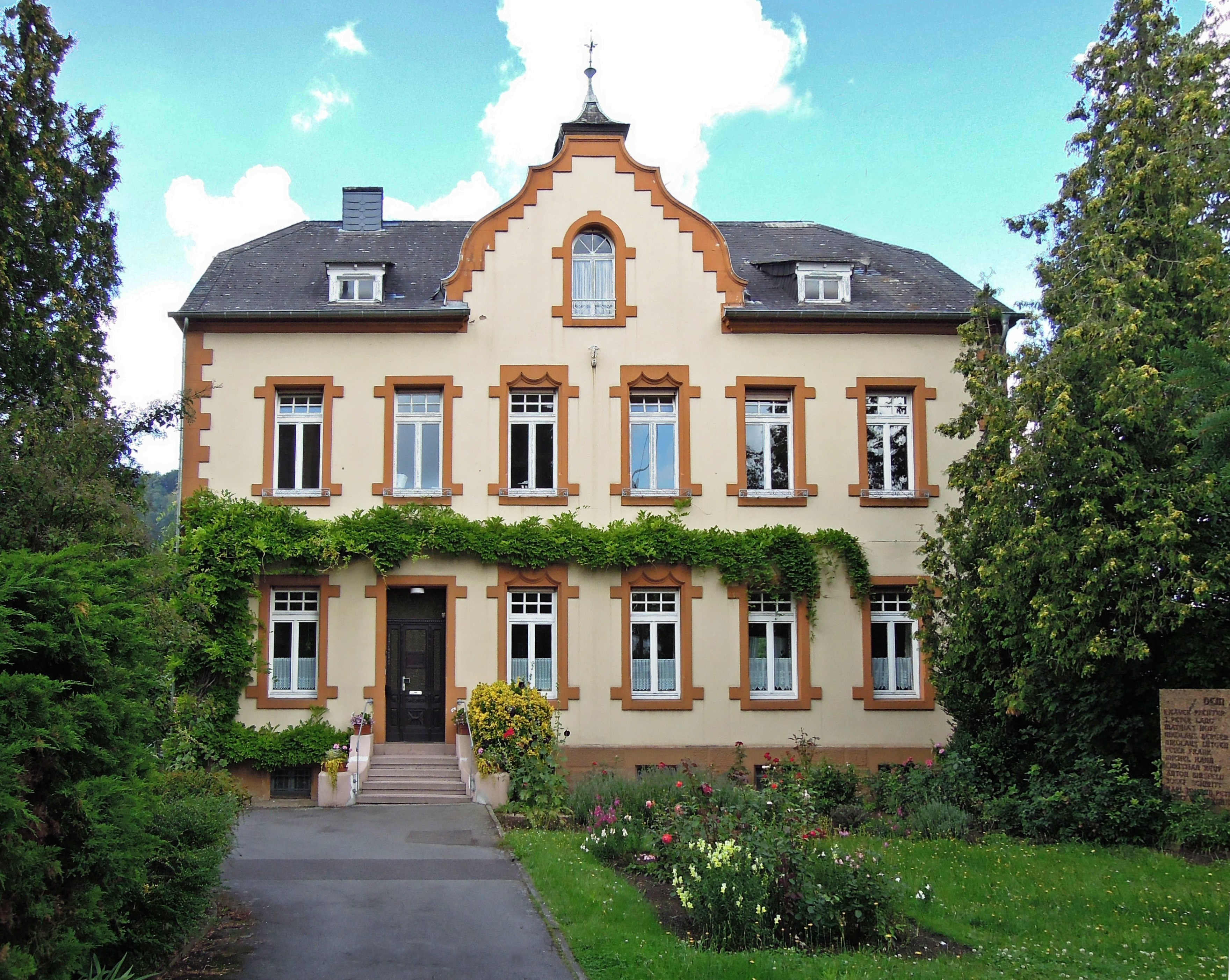 Pfarrhaus Kirche Wallerfangen